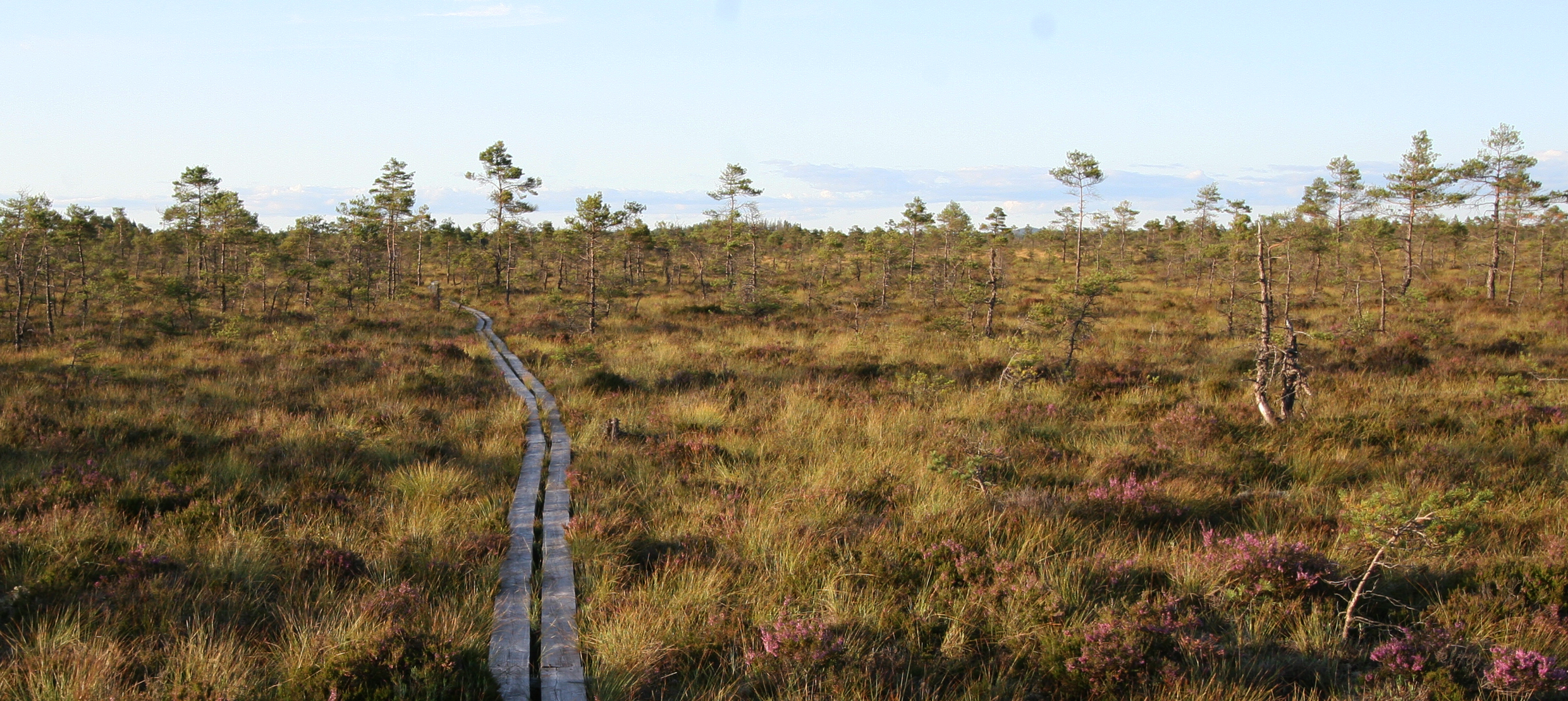 Store Mosse nationalpark